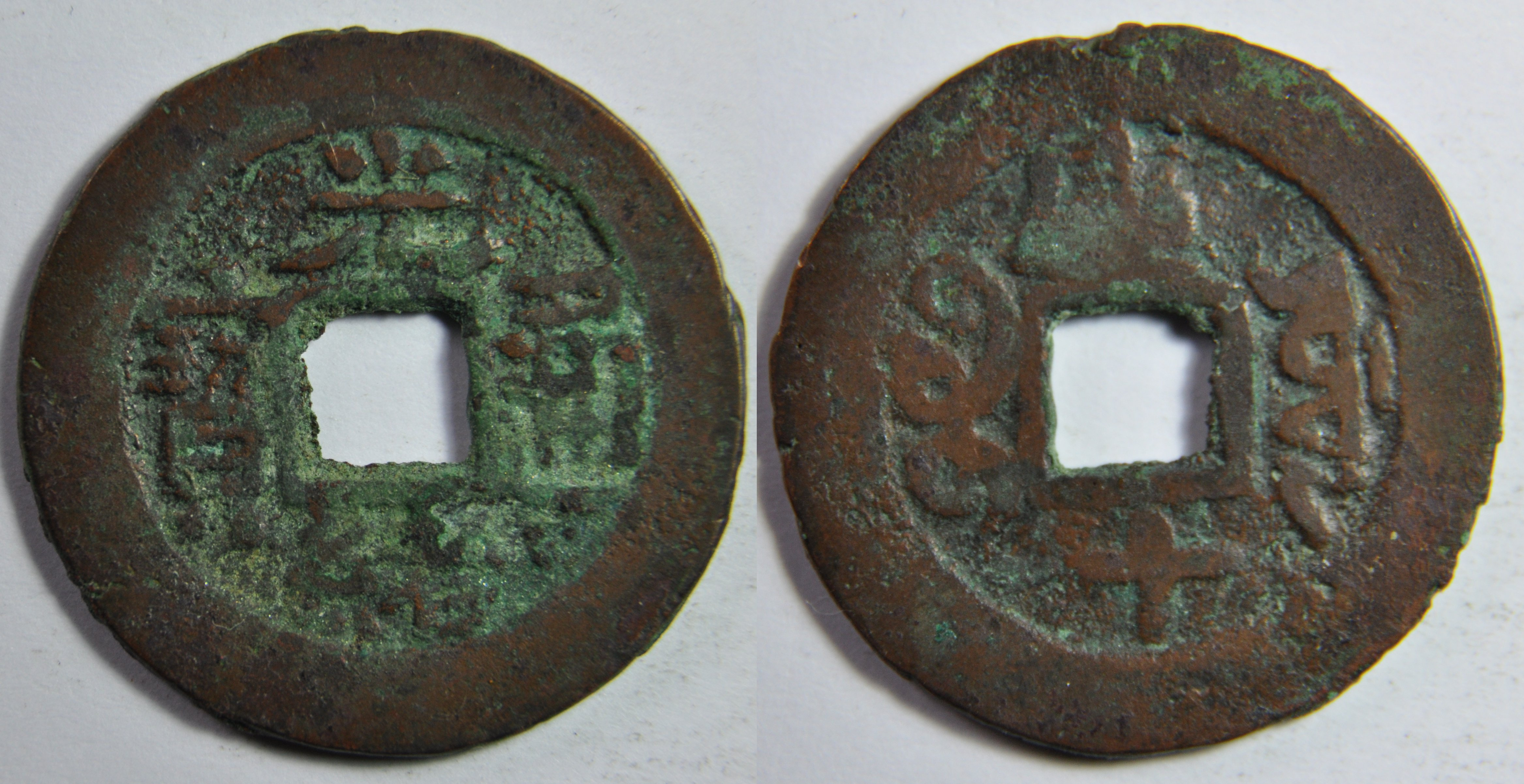 Une monnaie en cuivre rouge (Red cash) de 10 sapèques (10 cash) de l'empereur De Zong (1875-1908), ère Guang Xu (1875-1908) de la dynastie Qing (1644-1911), atelier de Kucha au Xinjiang. A/ Guang Xu zhong bao (Monnaie lourde de Guang Xu) R/ Bao yuan, Ku shi Dimension : 24,6 mm Poids : 3,4 g. Lecture en croix Référence : H22.1488 Cette monnaie a été émise entre 1888 et 1891. Kucha est une ville du bassin du Tarim sur la route de la soie. Il s'agit d'une oasis, ancienne capitale d'un royaume qui existait au temps de la dynastie Tang.